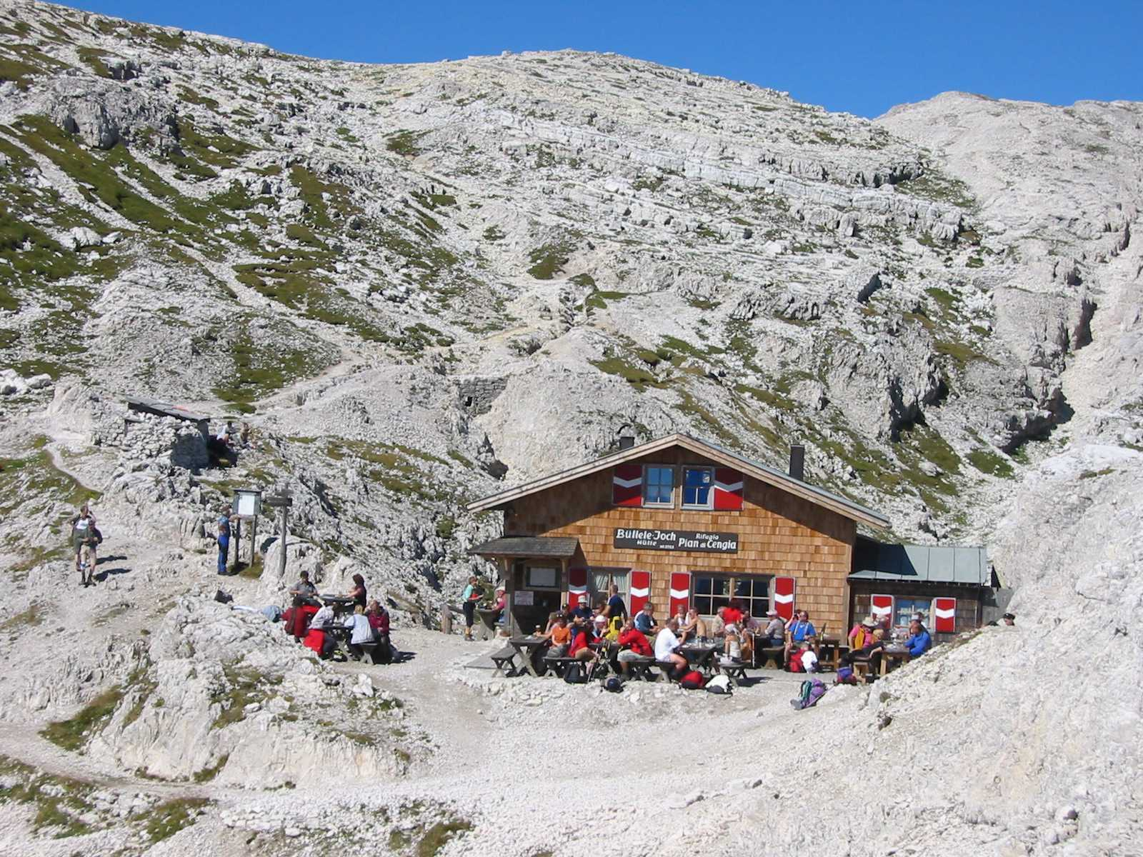 Foto scattata in settembre 2004 da Fantasy :-)